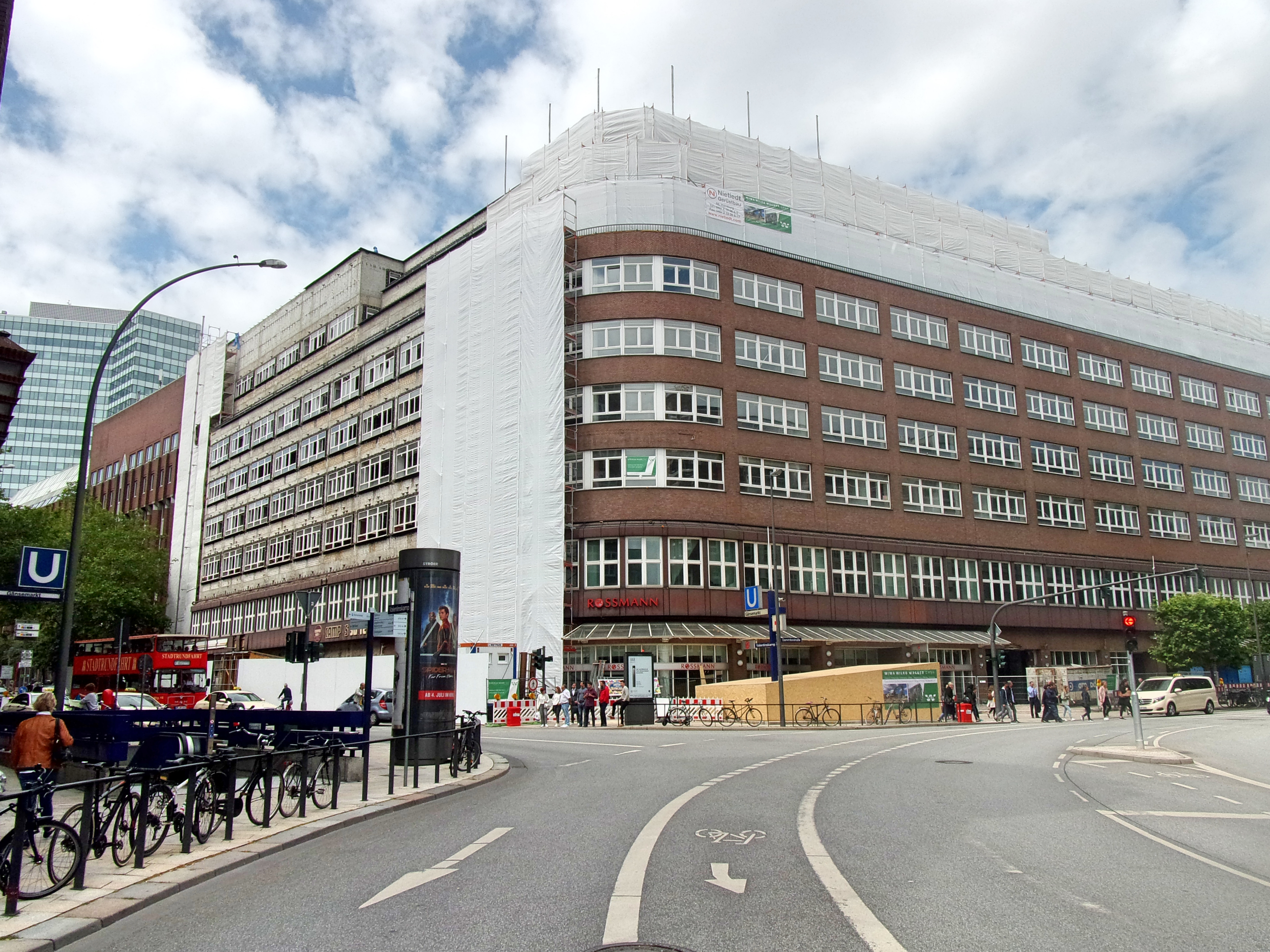 Das Deutschlandhaus bei der Entkernung und in Vorbereitung auf den geplanten Abriss. Rechts noch mit vollständiger Fassade in der Dammtorstraße, links mit bereits entfernter Fassadenverkleidung. Der Eingang zur U-Bahn am Gänsemarkt direkt vor dem Gebäude wird mit einer Holzverkleidung geschützt. Stand Juli 2019.